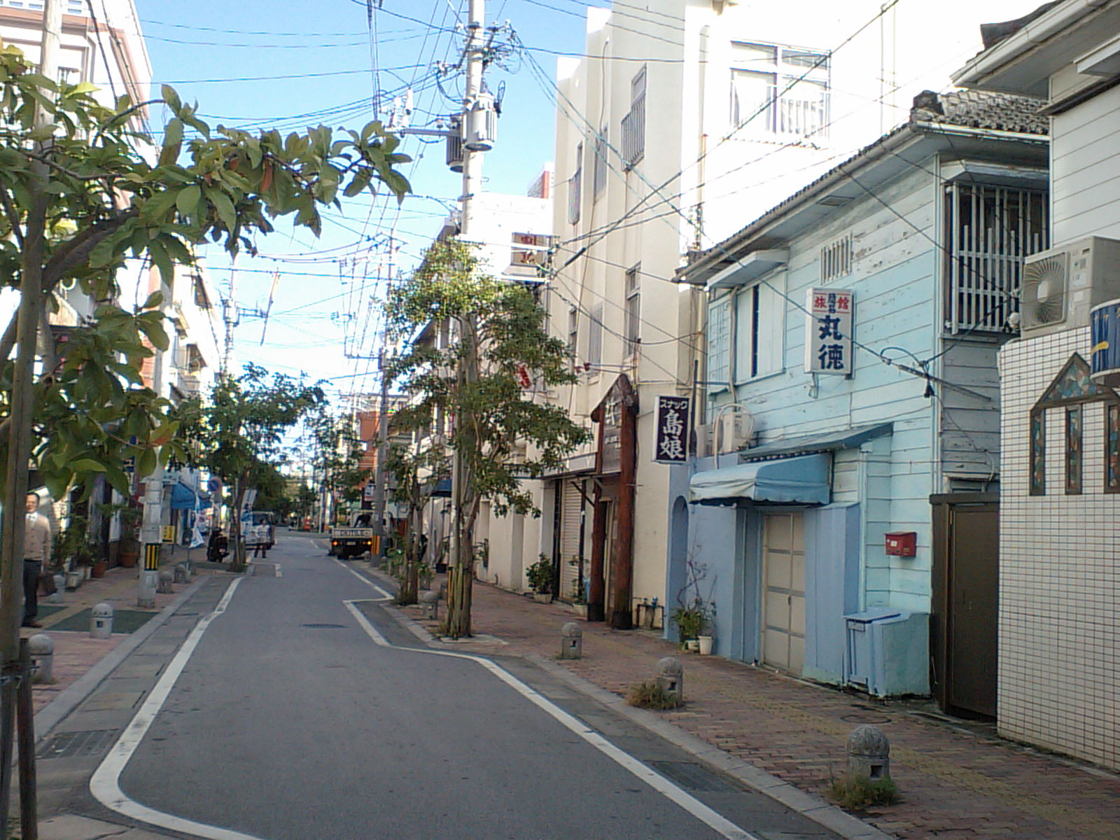 栄町社交街の北部と見なせる地域。栄町りうぼうの北の通りを東に向けて。「旅館」も確認できる。平日夕方。